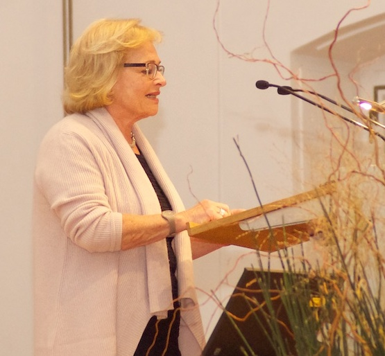 Medizin am Hof der Salzburger Barockfürsten. Am 3. November 2015 fand die Buchpräsentation des neuen Buches der Universitätsbibliothek Salzburg über Schätze im Universitätsarchiv statt. Autor/innen sind Christoph Brandhuber und Edith Tutsch-Bauer.Sie prüften die Salzburger Erzbischöfe und deren Tod auf Herz und Nieren. Anhand von alten Quellen erzählen sie, warum die hohen Herren bisweilen Gift und Galle spuckten, was ihnen unter die Haut ging oder sogar das Blut in den Adern stocken ließ. Fotos: Hans-Christian Gruber (CC: BY)